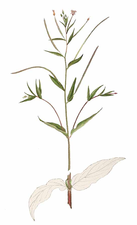 Epilobium adenocaulon Hauskn.